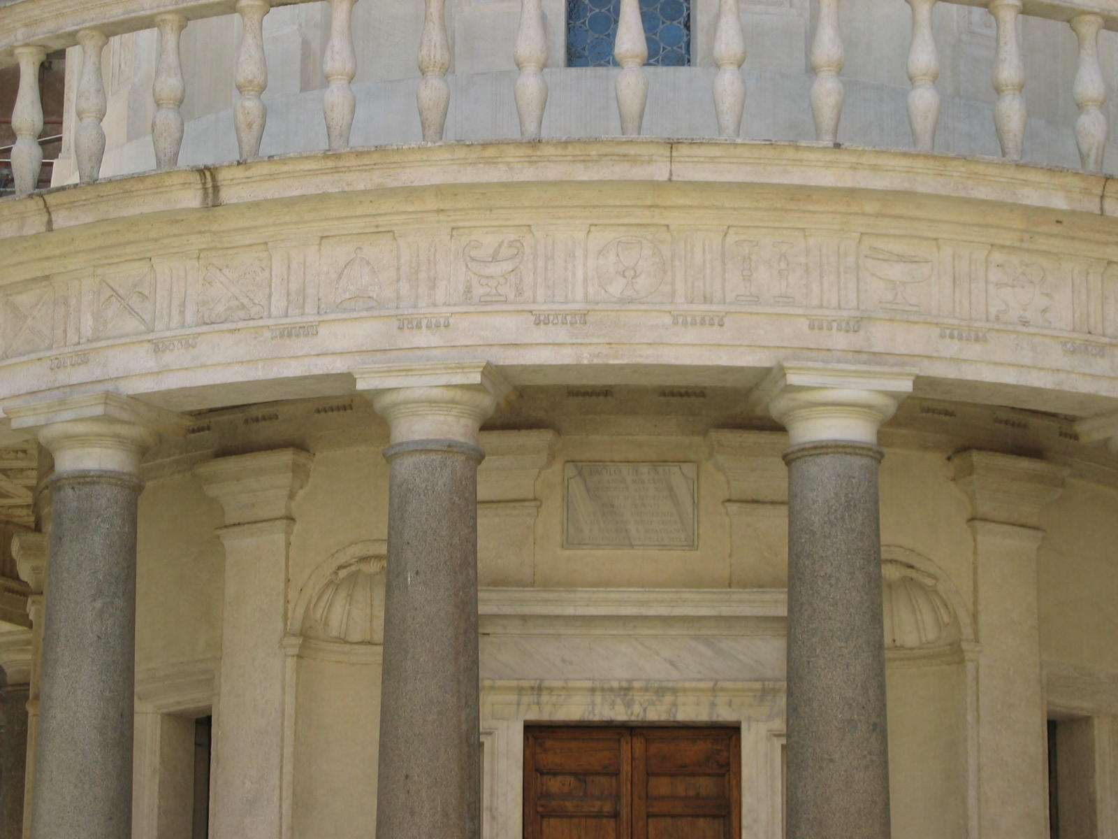 Donato Bramante, Tempietto, San Pietro in Montorio, Roma. Picture by User:Torvindus.